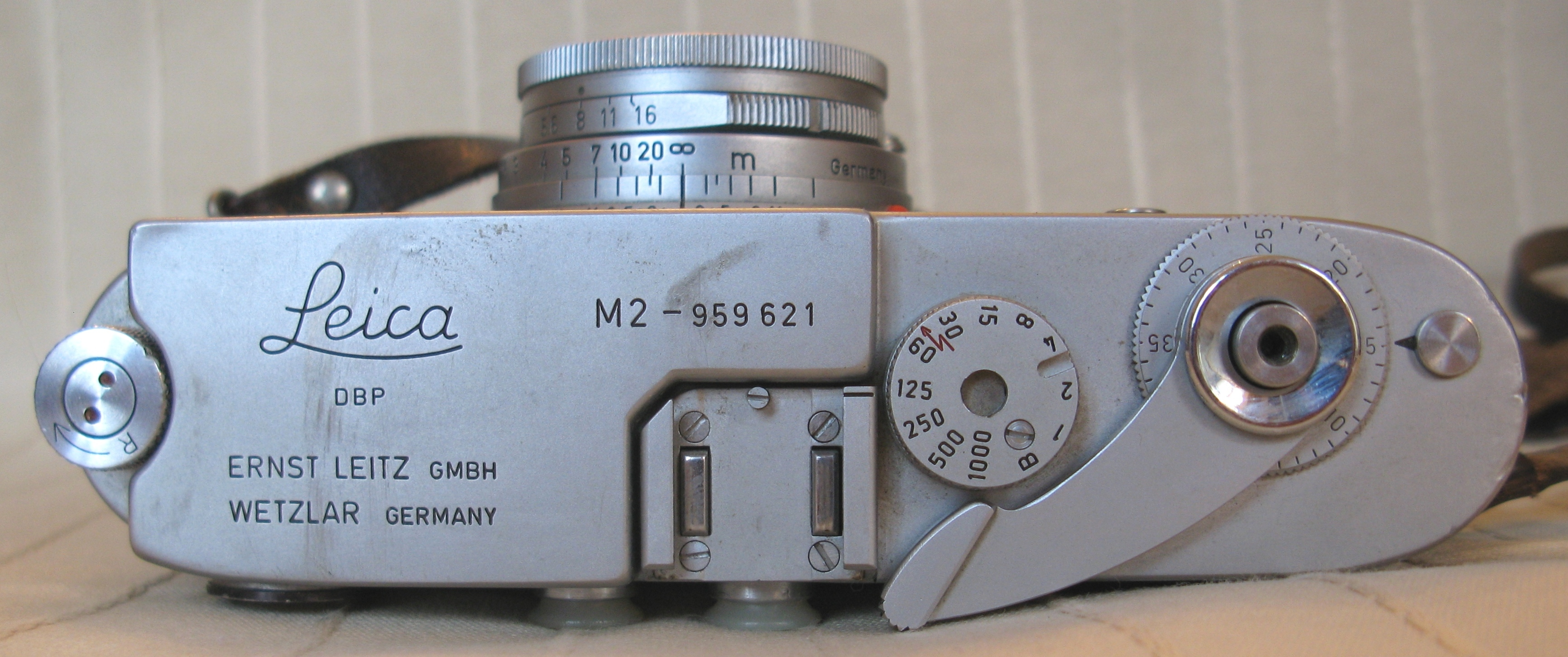 Eng Leica M2 vun uewe gesinn. Kategorie:Fotoapparaten